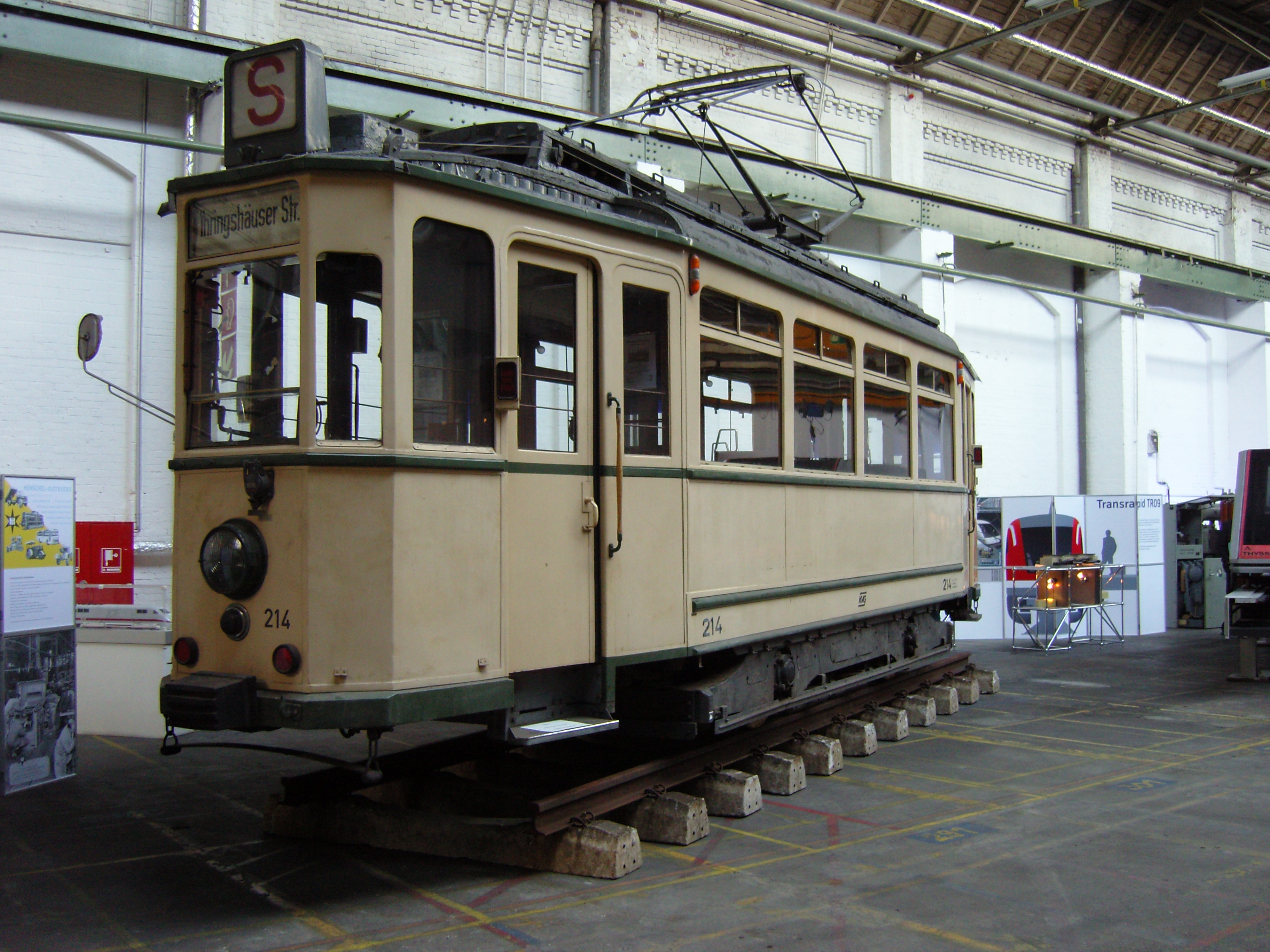 Straßenbahntriebwagen 214 (Baujahr 1936, Credé) der Kasseler Straßenbahn Gesellschaft im Technik-Museum Kassel